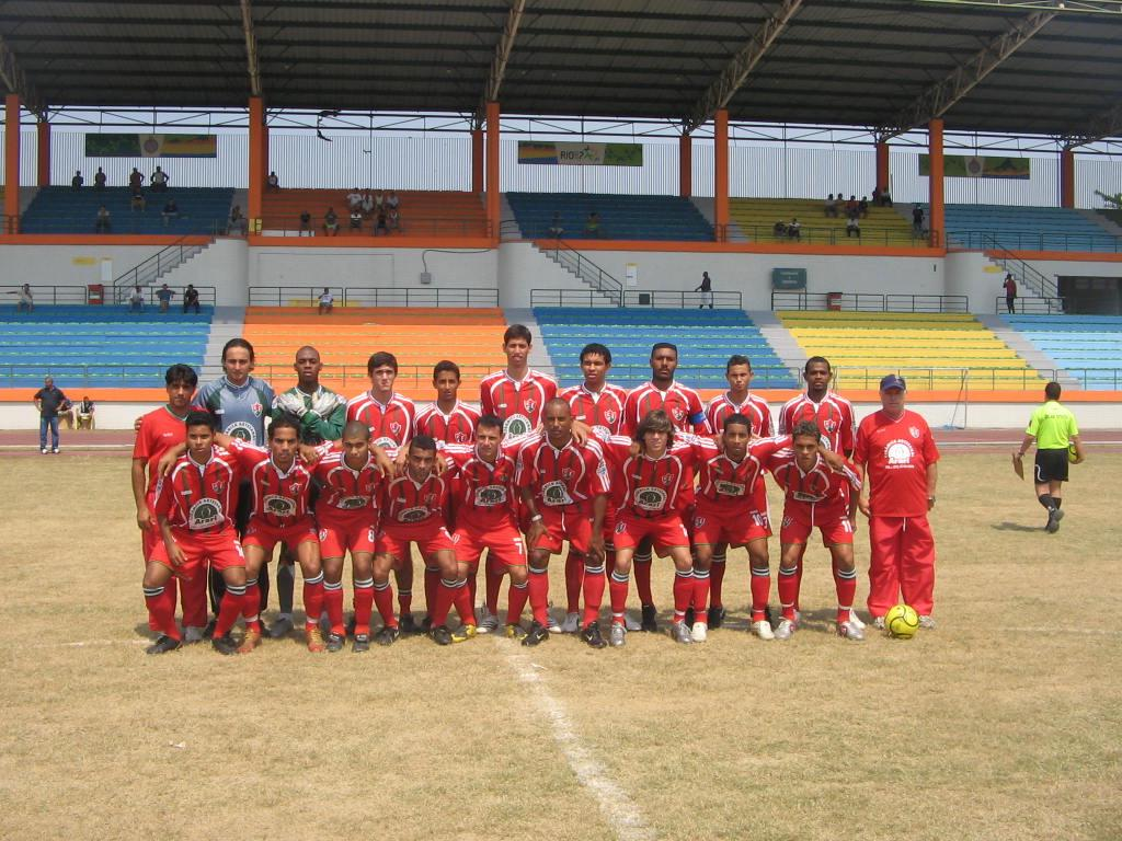 Equipe da Cachoeiras Esporte Clube